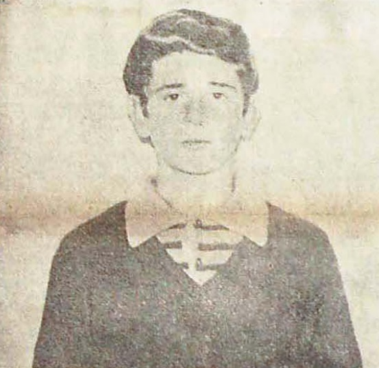 Luis Norberto Blanco (1954 - Rosario, 21 de mayo de 1969). Argentina. Fue un aprendiz de obrero metalúrgico y estudiante de secundaria argentino asesinado durante las movilizaciones conocidas como el Rosariazo y realizadas contra la dictadura militar dirigida por el general Juan Carlos Onganía. Foto del diario de la CGT de los Argentinos.